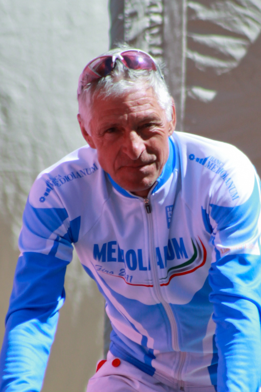 Etape 20 (Sestrière) du Tour d'Italie 2011